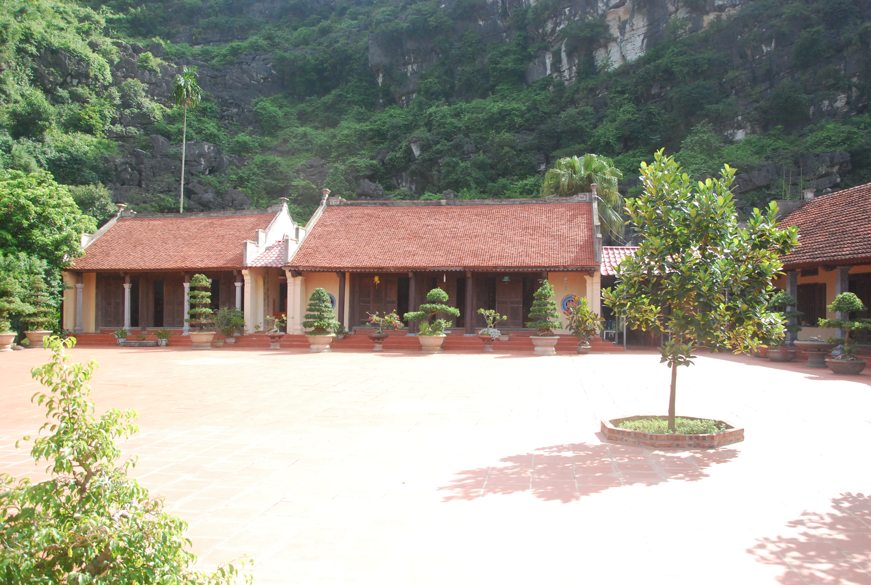 chùa Duyên Ninh trong Quần thể di tích Cố đô Hoa Lư ở Ninh Bình